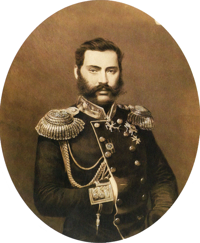 Адлерберг, Александр Владимирович